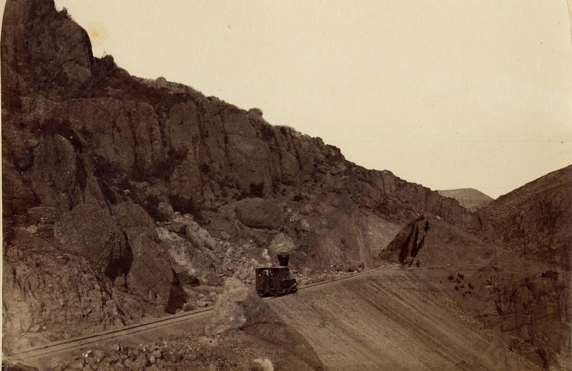 Paso del ferrocarril de Valparaíso a Santiago, por la ladera de un cerro pedregoso (Rowsell y Courret Hermanos, Valparaíso, Chile). The Southern Railway of Chile, who operated the Valparaíso to Santiago line, had a mix of Rogers Locomotive & Machine Works (Patterson, New Jersey, USA) and R&W Hawthorn (Newcastle, England) locomotives in the 1859-1863 time frame.